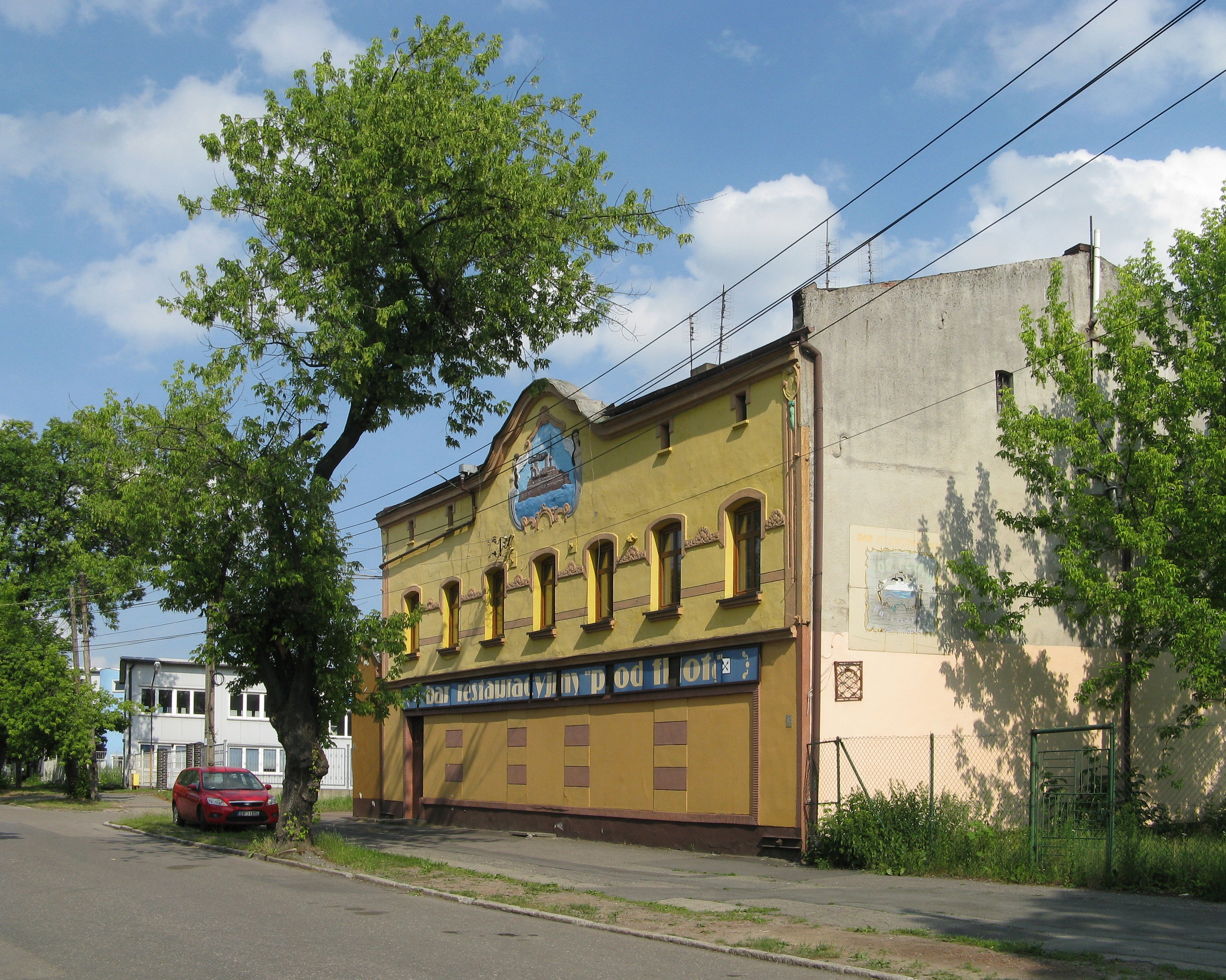 Budynek baru restauracyjnego „Pod Flotą” w Bytomiu-Karbiu, ul. Konstytucji 138.